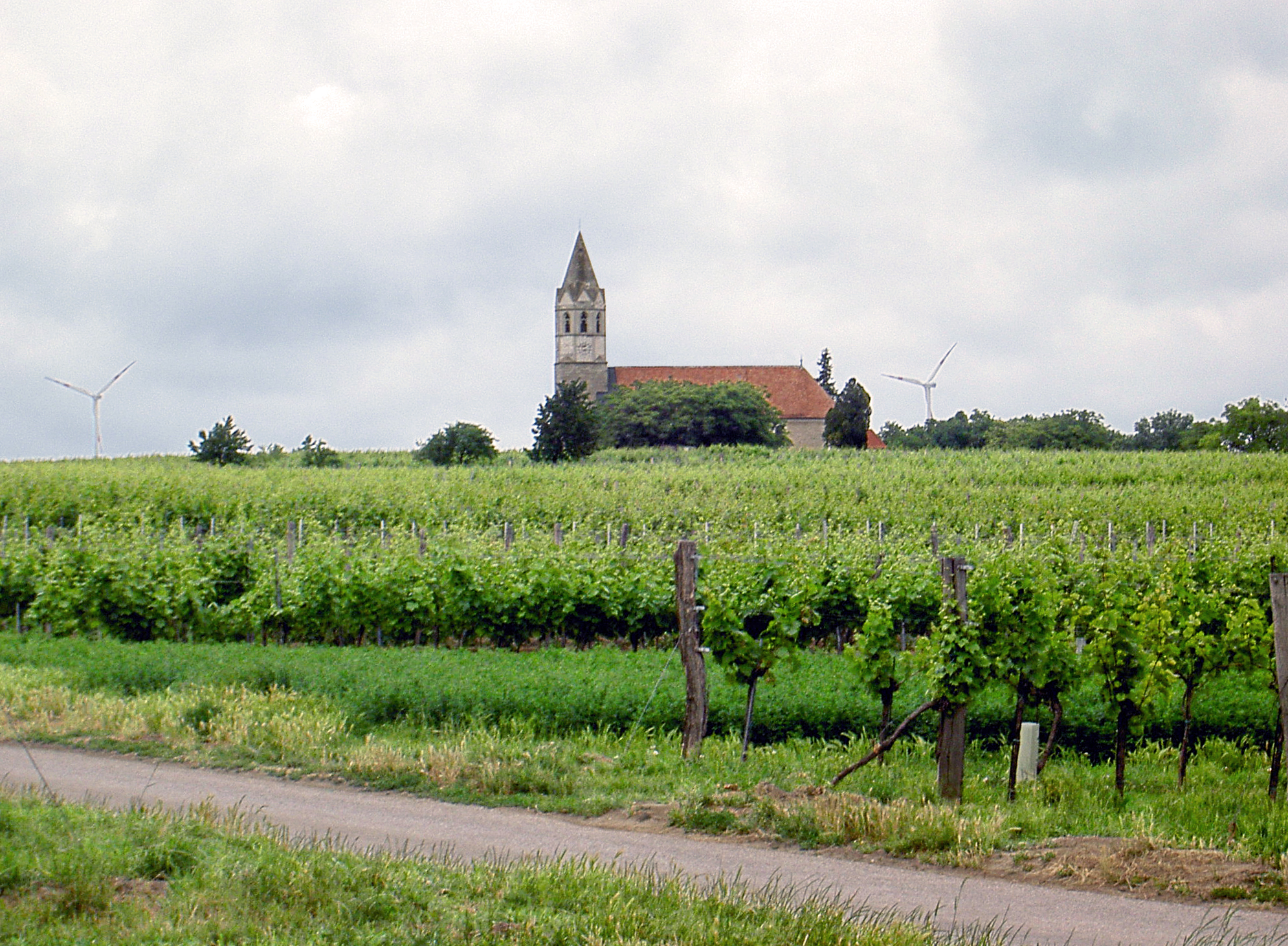 Kirche in Höflein, Bezirk Bruck, NÖ, Austria